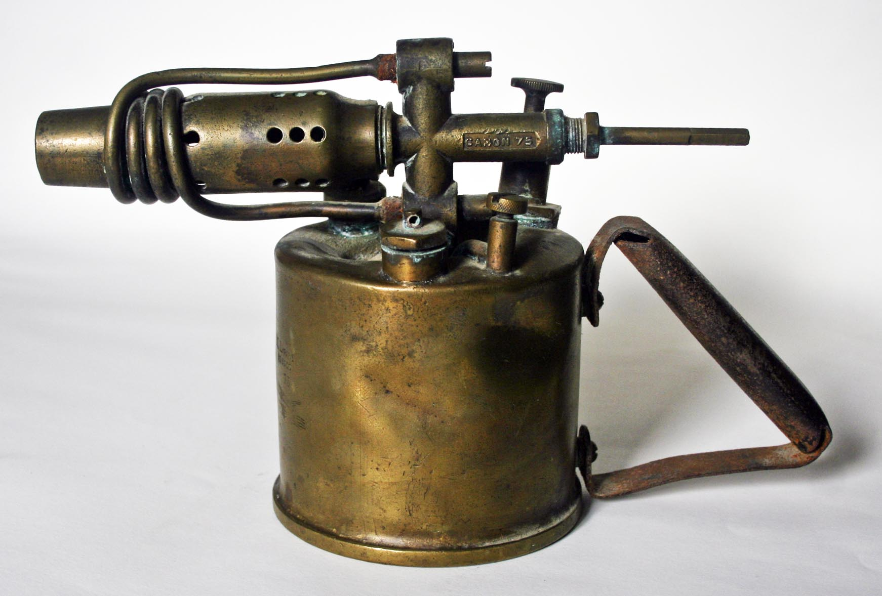 Lampe à souder (à braser) de marque Canon 75